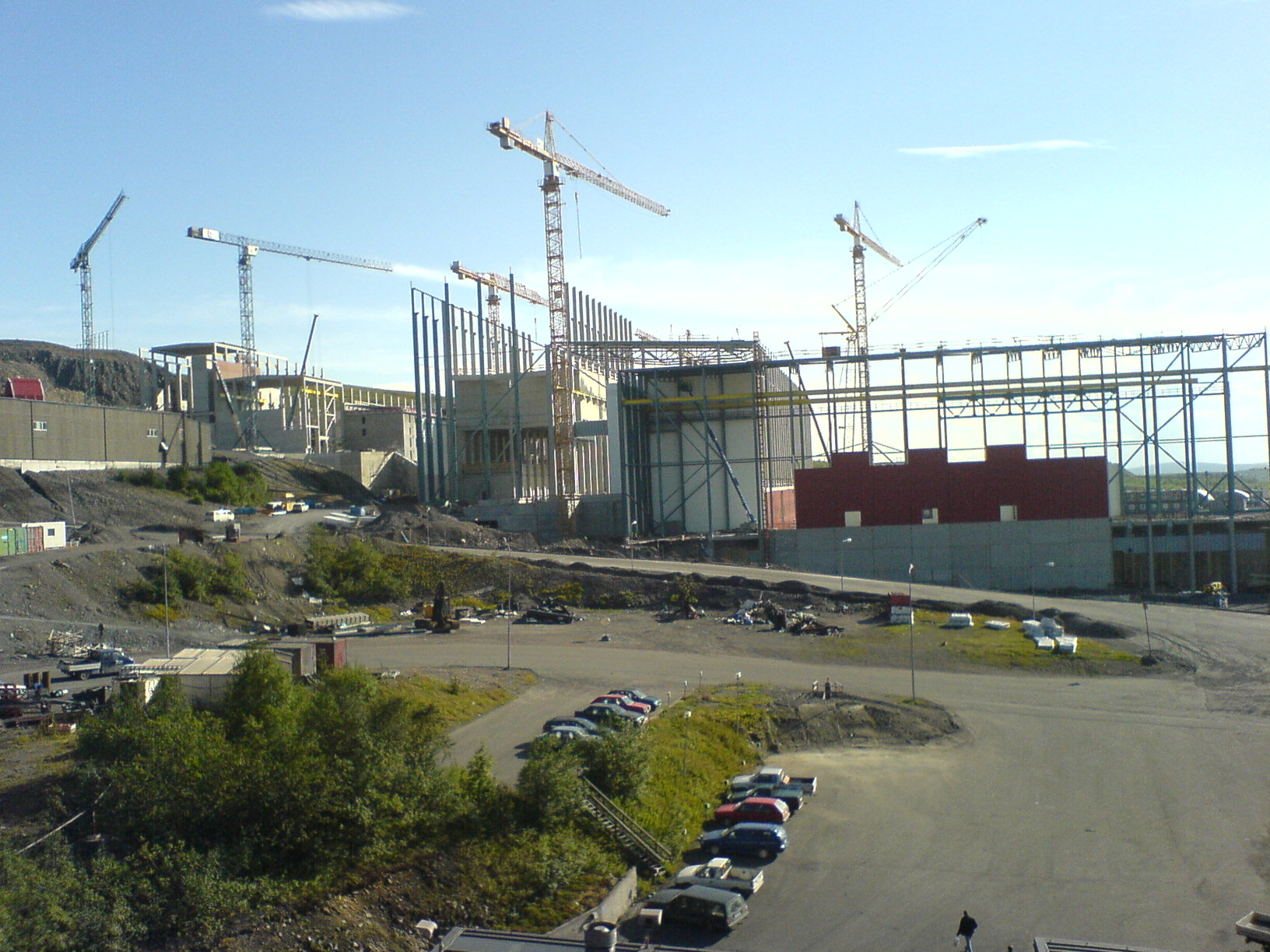 LKAB:s nya pelletsverk KK4 i Kiruna, egen bild